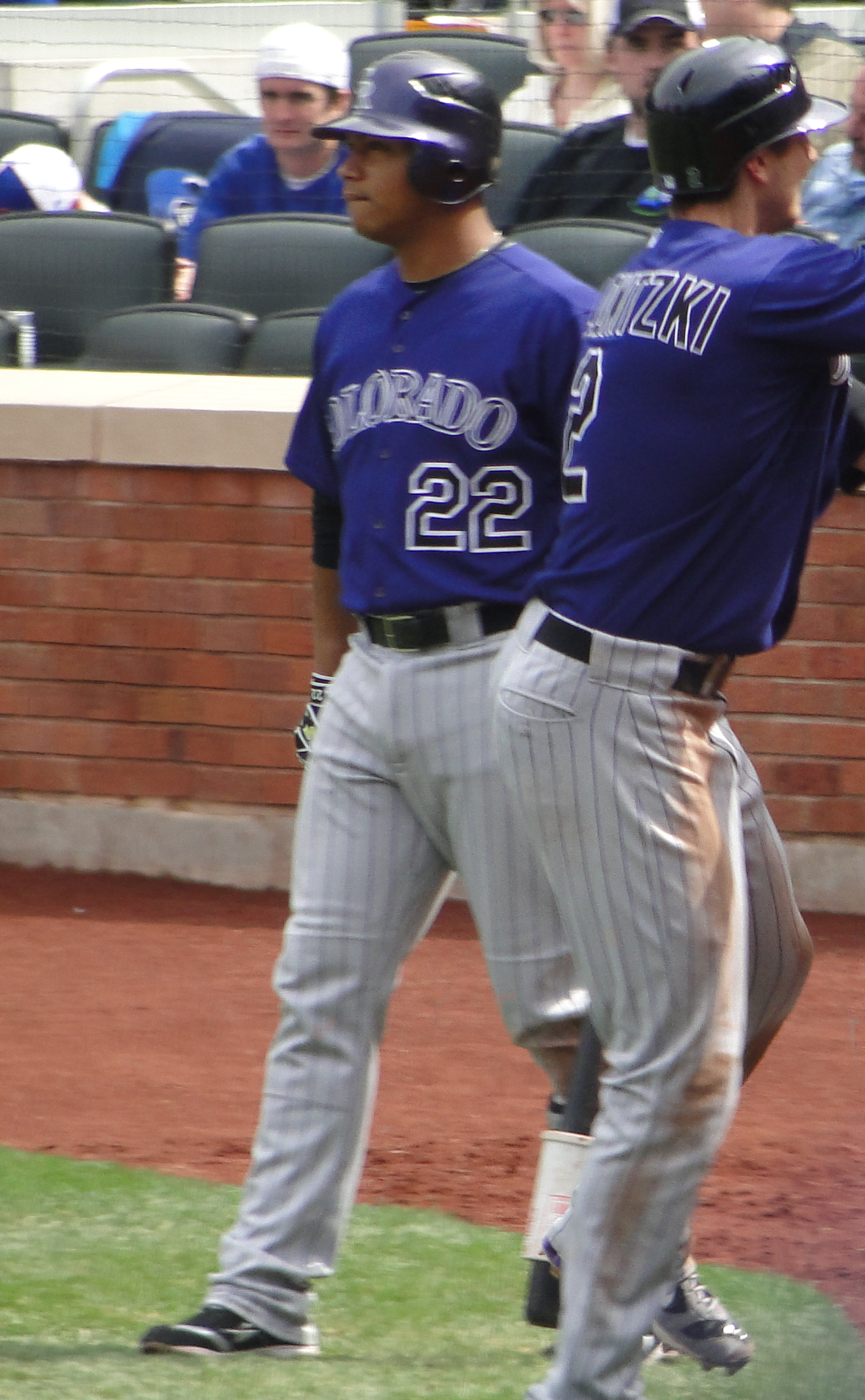 José López